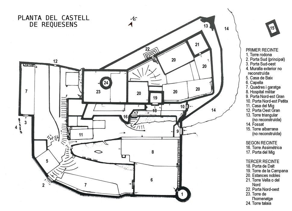 Planta del castell de Requesens (Alt Empordà) / Plan of the Requesens castle (Alt Empordà).